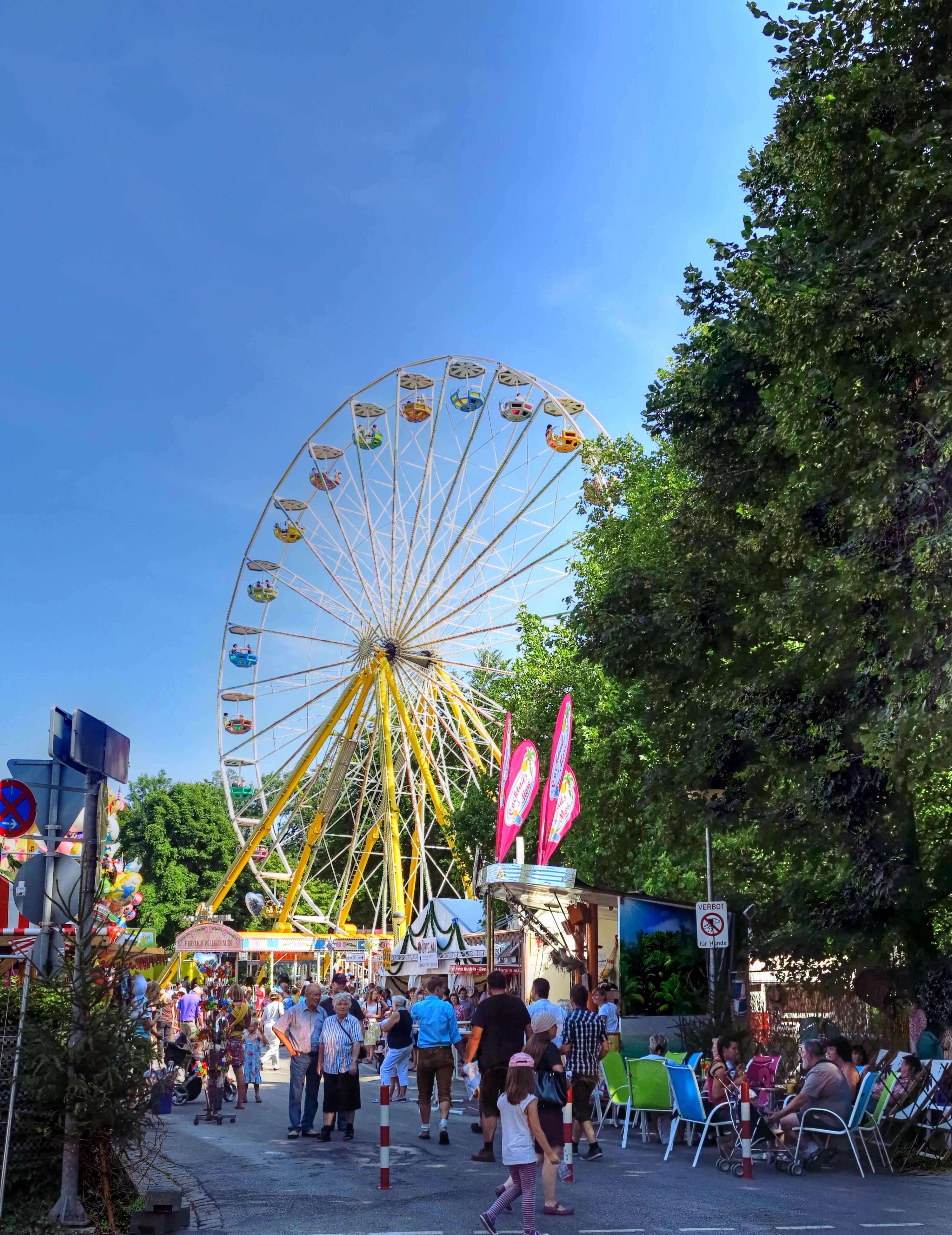 Deutschland, Bayern, Landkreis Dachau, Dachau, Volksfest 2012